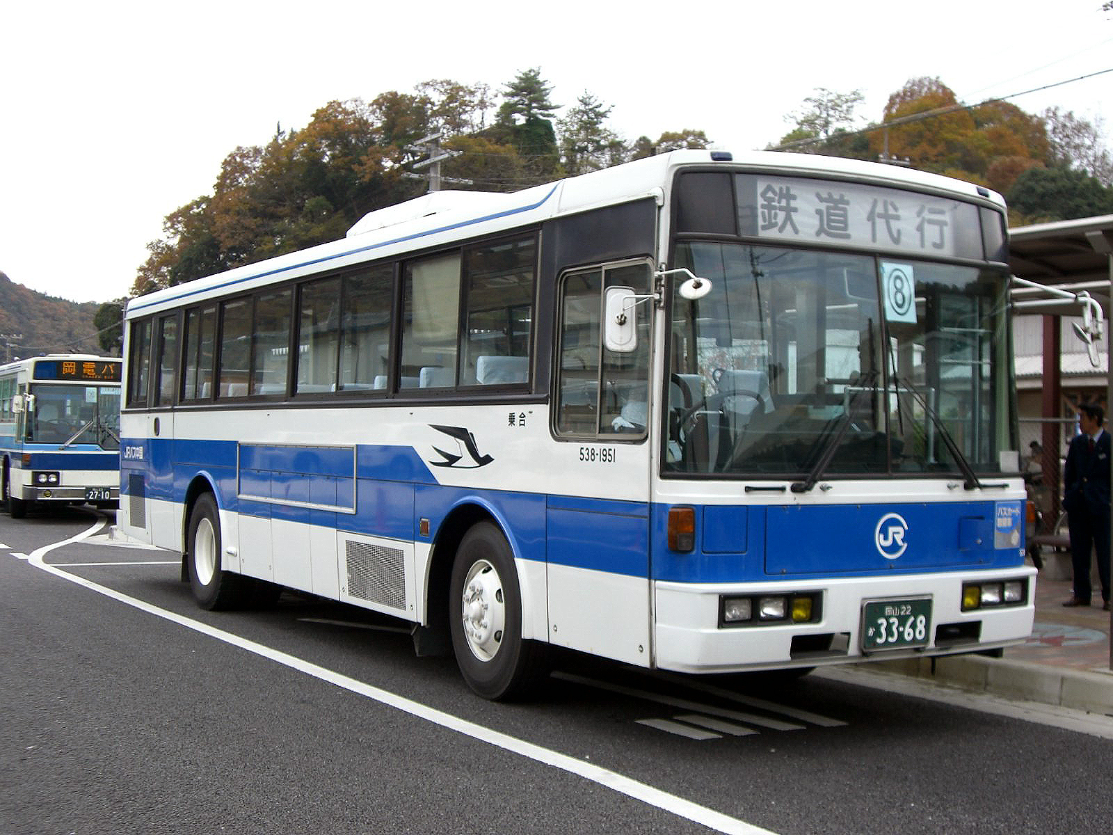 JRバス中国、津山線の代行バス。金川駅にて。